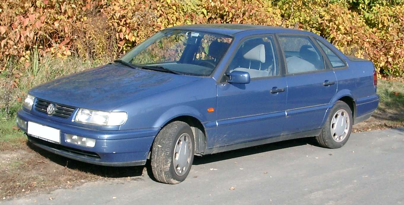 VW Passat B4